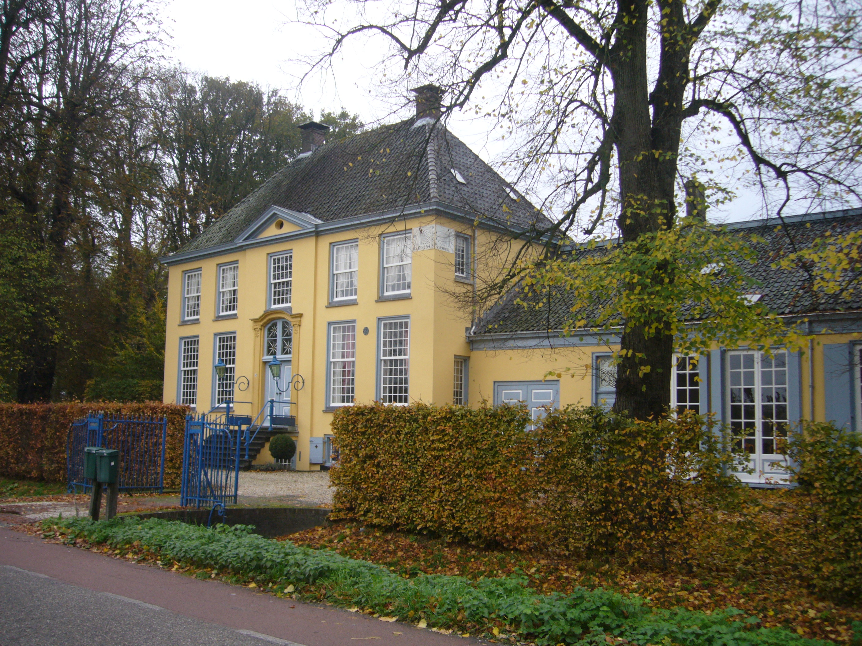 Baambrugge, monument in Baambrugge